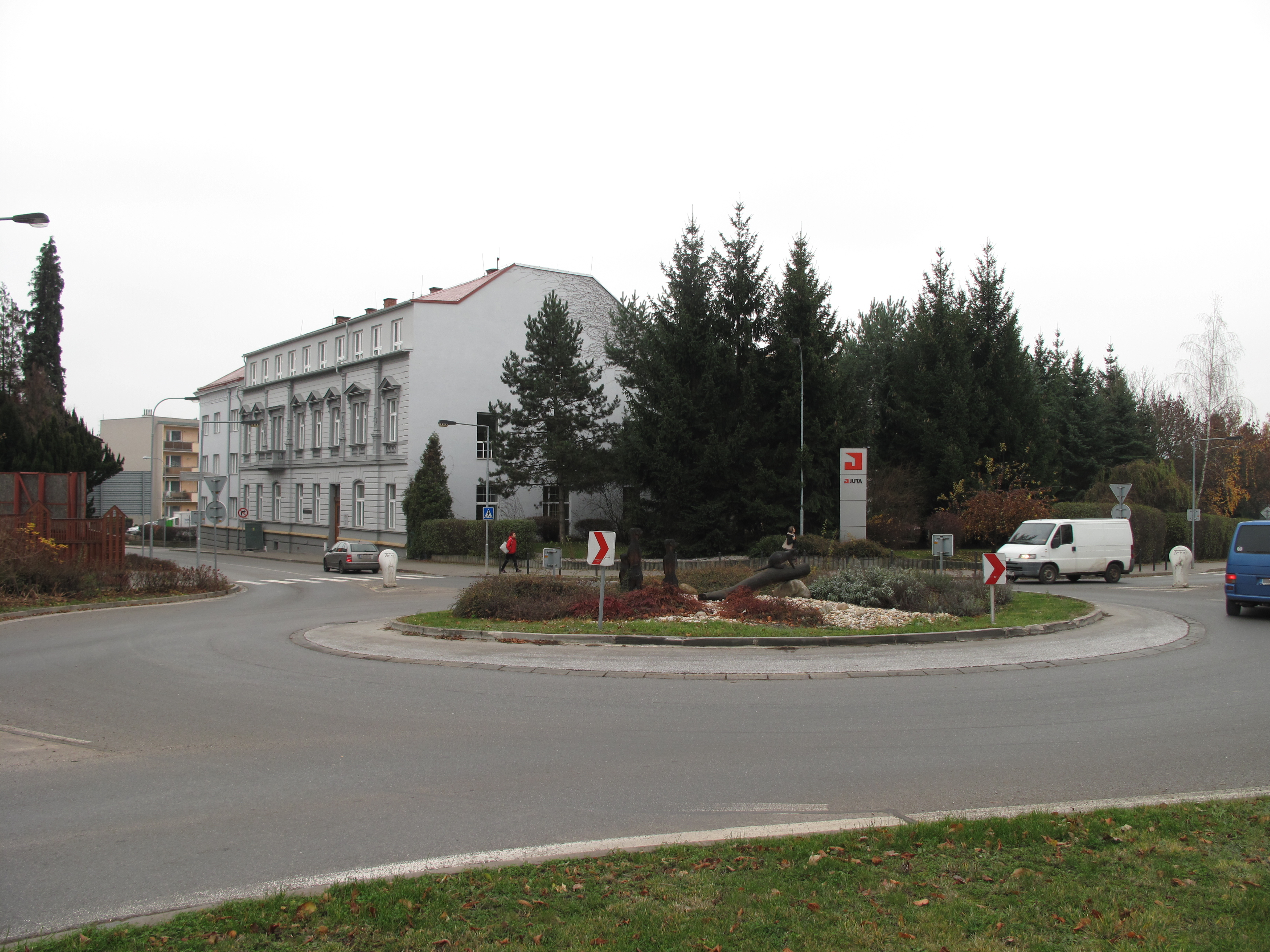 Sídlo JUTA a.s. v Dukelské ulici ve Dvoře Králové nad Labem. Okres Trutnov, Česká republika.